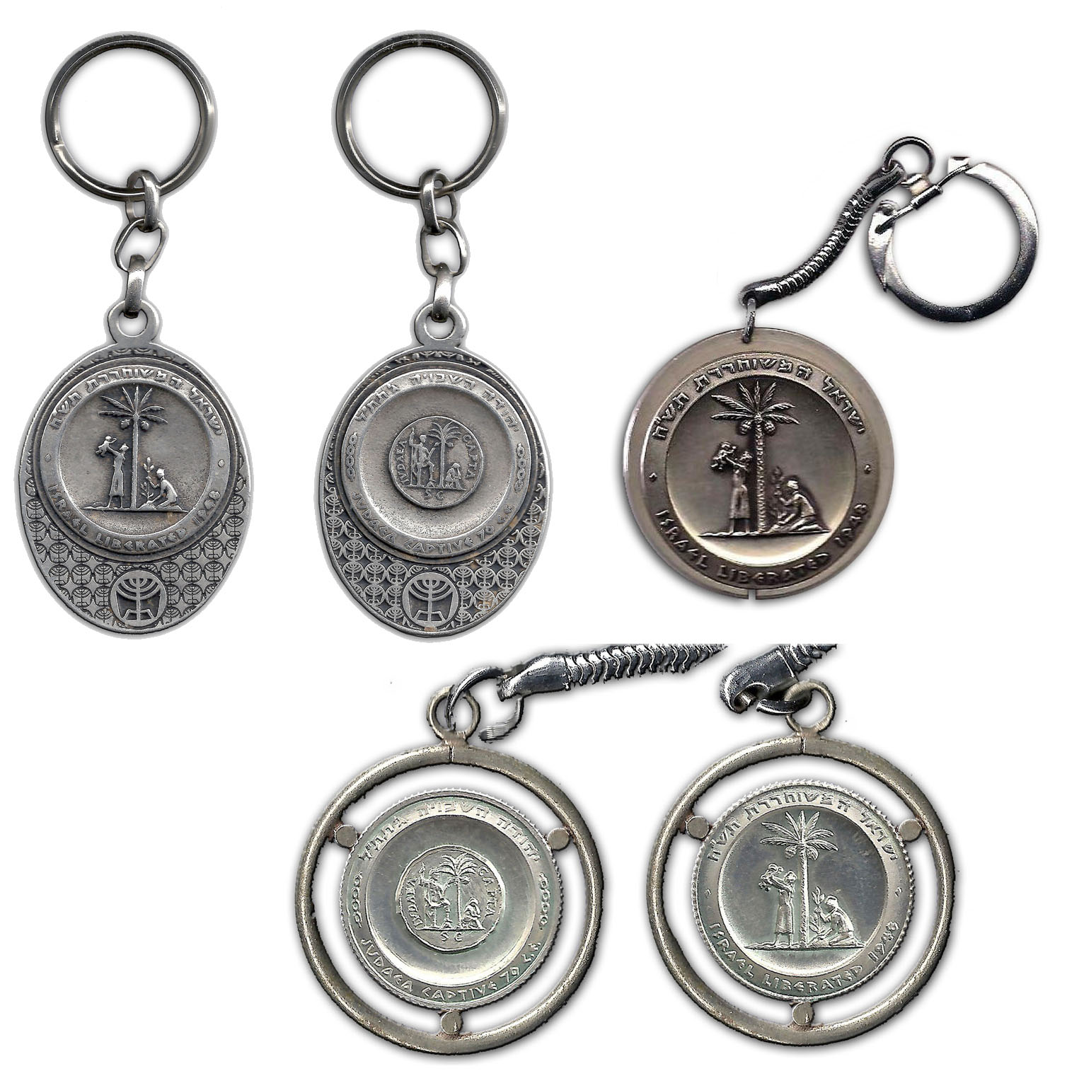 מדליית שחרור דור ג' - מחזיקי מפתחות